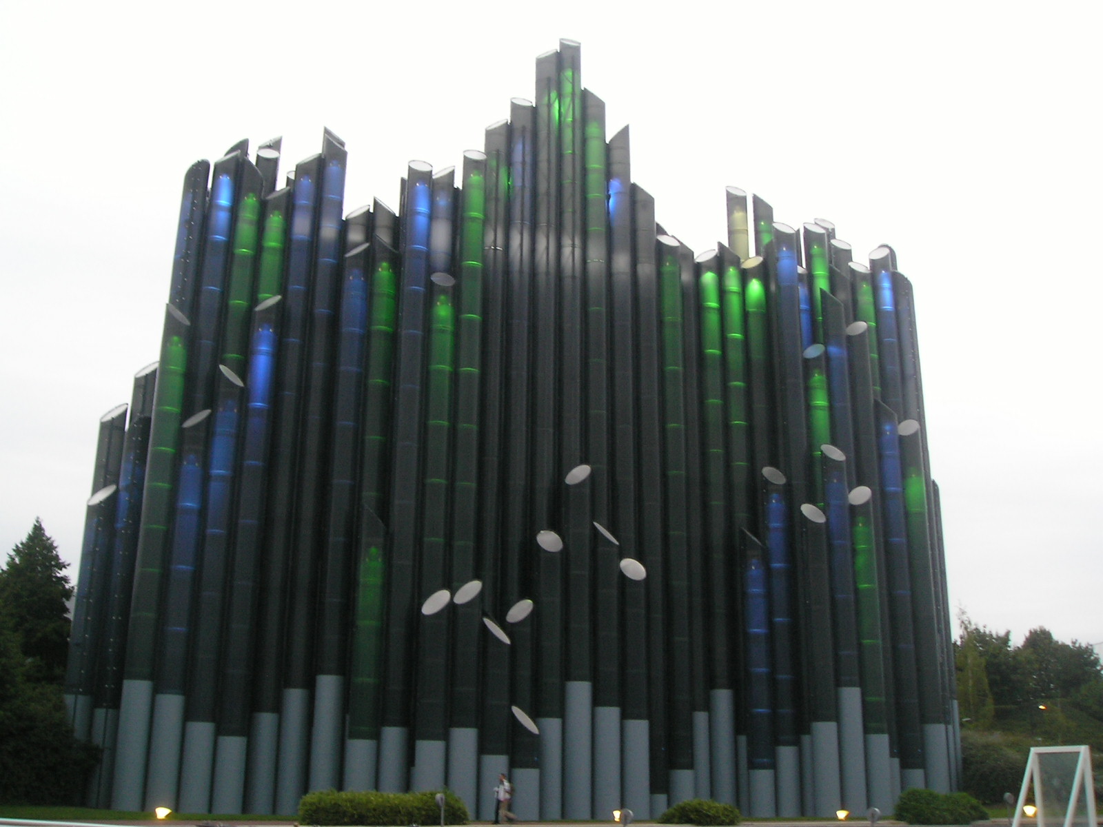 Le Tapis Magique, un pavillon du parc du Futuroscope.